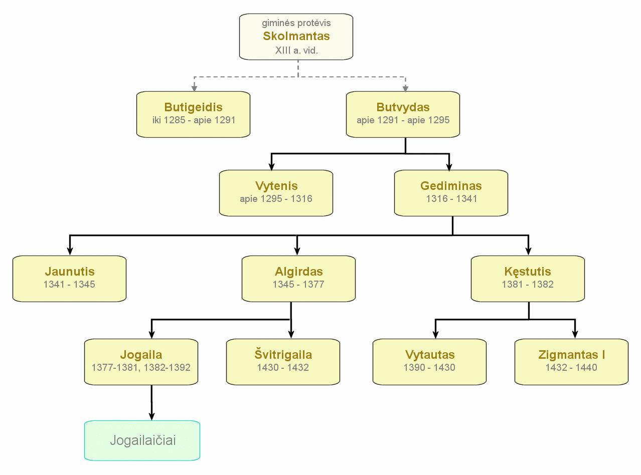 Gediminaičių dinastija